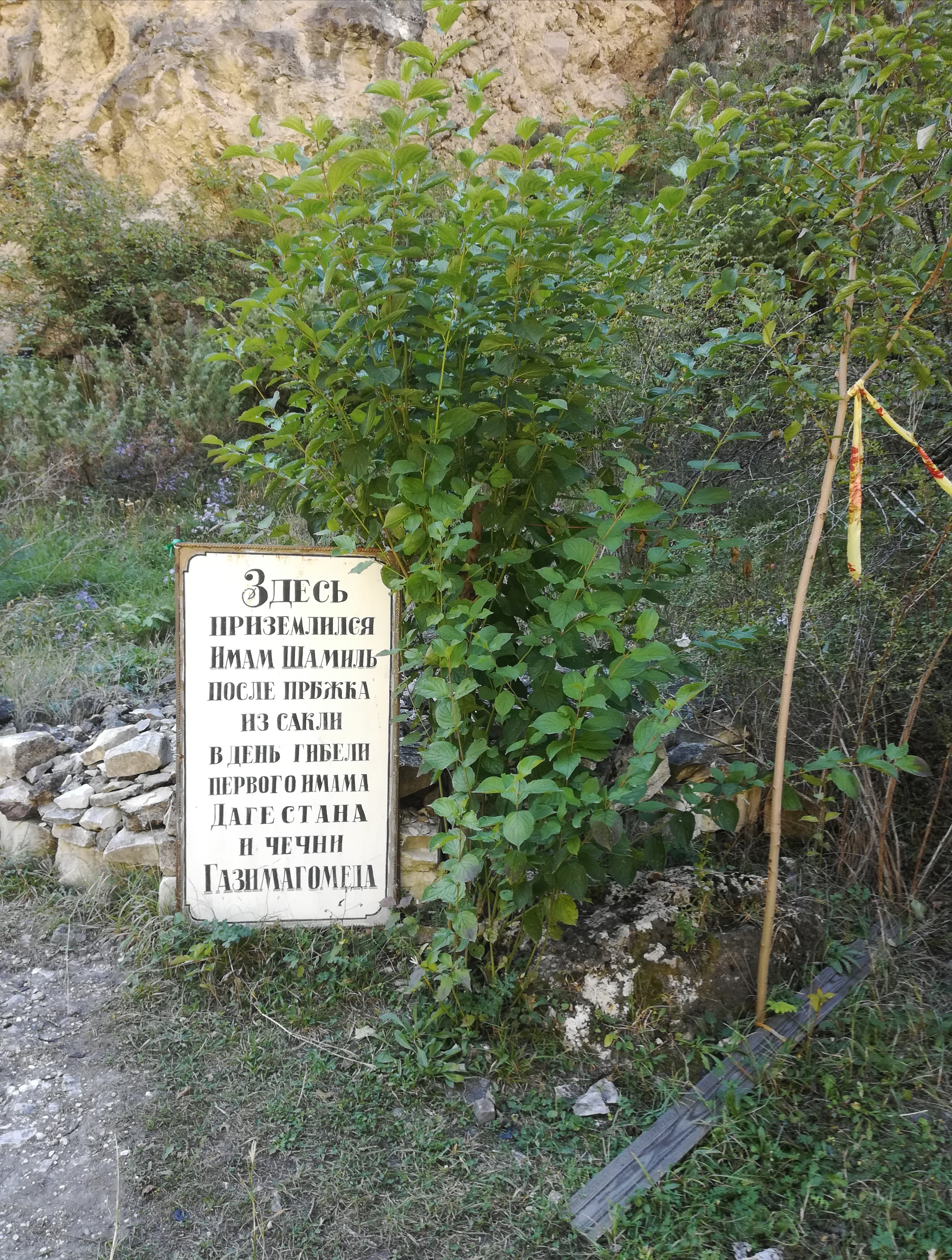 Дагестан